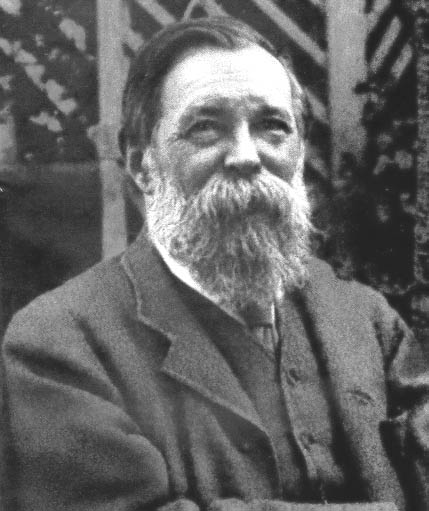 Friedrich Engels (* 28. November 1820 in Barmen in Preußen (heute zu Wuppertal); † 5. August 1895 in London) war ein Politiker, Unternehmer, Philosoph und Militärhistoriker. Er entwickelte gemeinsam mit Karl Marx die heute als Marxismus bezeichnete revolutionäre soziale Gesellschaftstheorie.